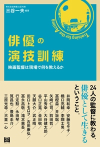 最前線で活躍する日本の映画監督たちによる「俳優」指南書 演技のための方法論や訓練法に関する本は数多くあるが、最前線で活躍する日本の映画監督たちが「独自の演出」について詳細まで語ったものは少ない。本書では、映画24区におけるワークショップの内容をもとに、映画監督24名の現場での具体的な演技指導法から、俳優業界事情をふまえた成功への道のり、俳優業を続けていくためのライフスタイルの提案まで、1冊に収録。「俳優として生きる」とはどういうことか──演技力を高め、長く活躍するための実践的アドバイスが詰まっています。